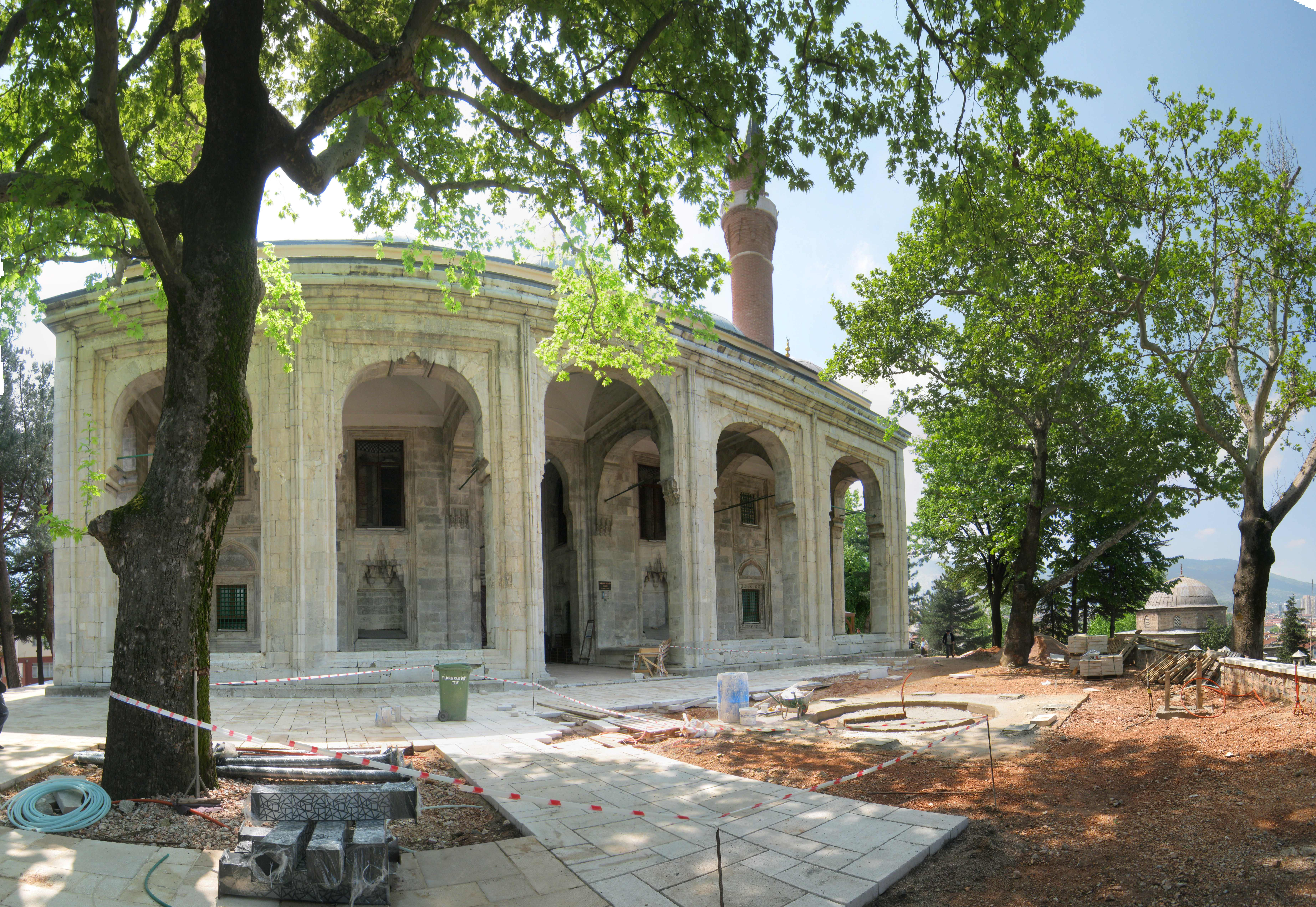 yıldırım bayezıd camii bursa